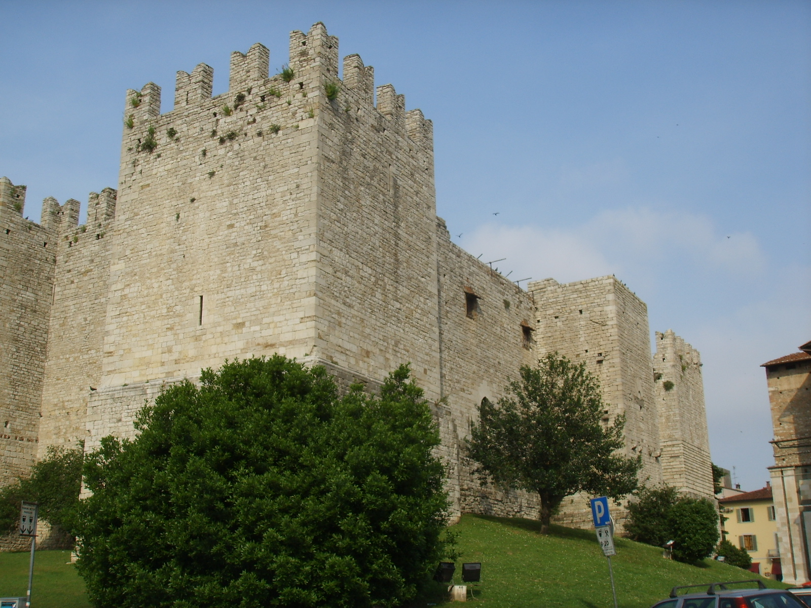 Castello dell'imperatore, lato